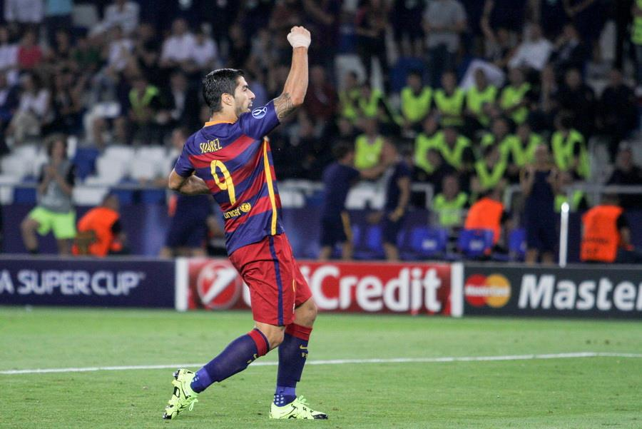 Матч за Суперкубок УЄФА 2015 року у Тбілісі. Грузія